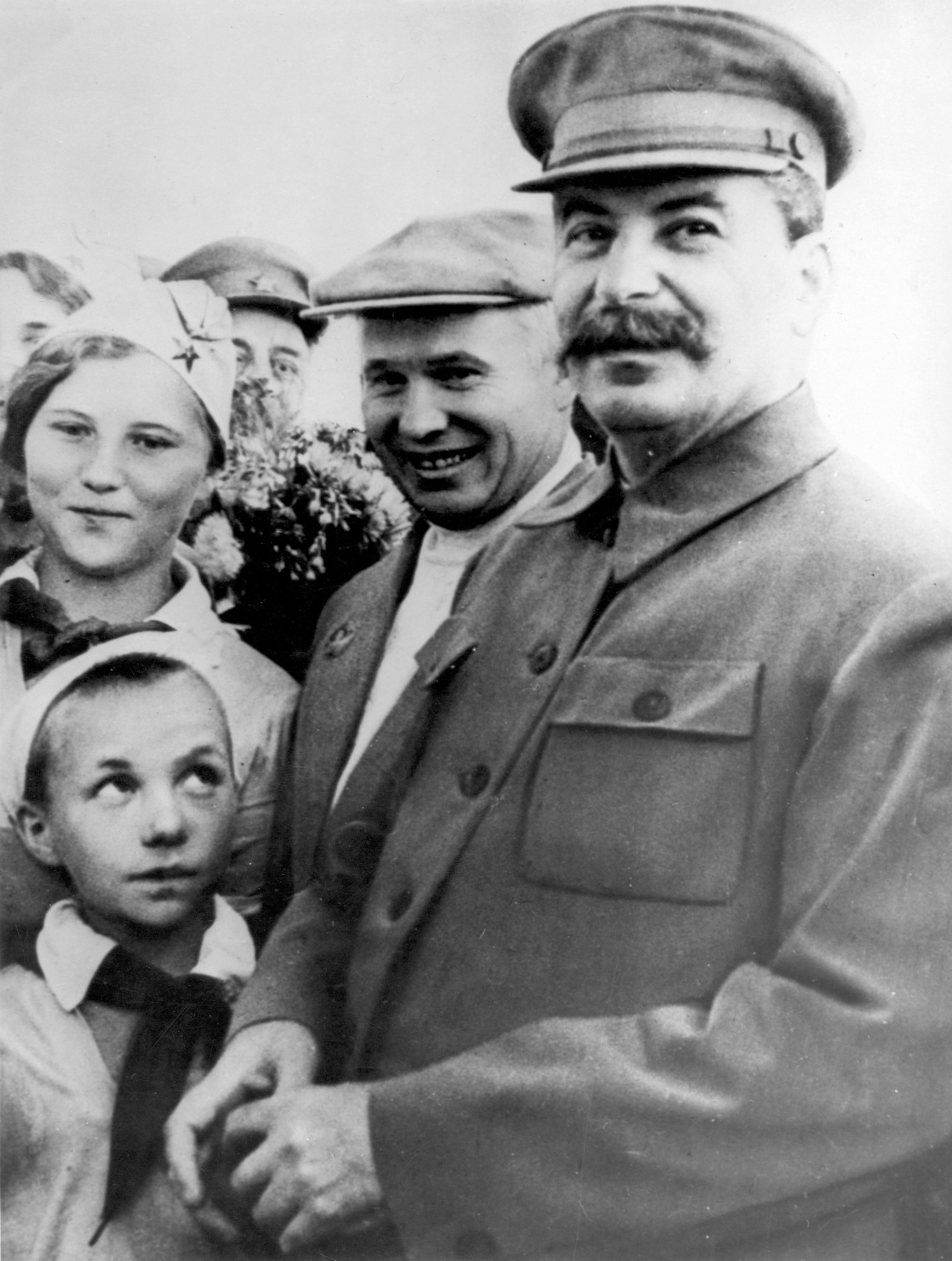 Nikita Sergevitsj Khroetsjof [1894-1971], ook wel geschreven als Chroesjtsjov /Khrushchev/Chruschtschow/ Khroetsjev, Sovjet policitus en partijleider van de Russische Communistische partij. Foto: Nikita Khroetsjof (met pet) met Jozef Stalin, midden jaren '30.